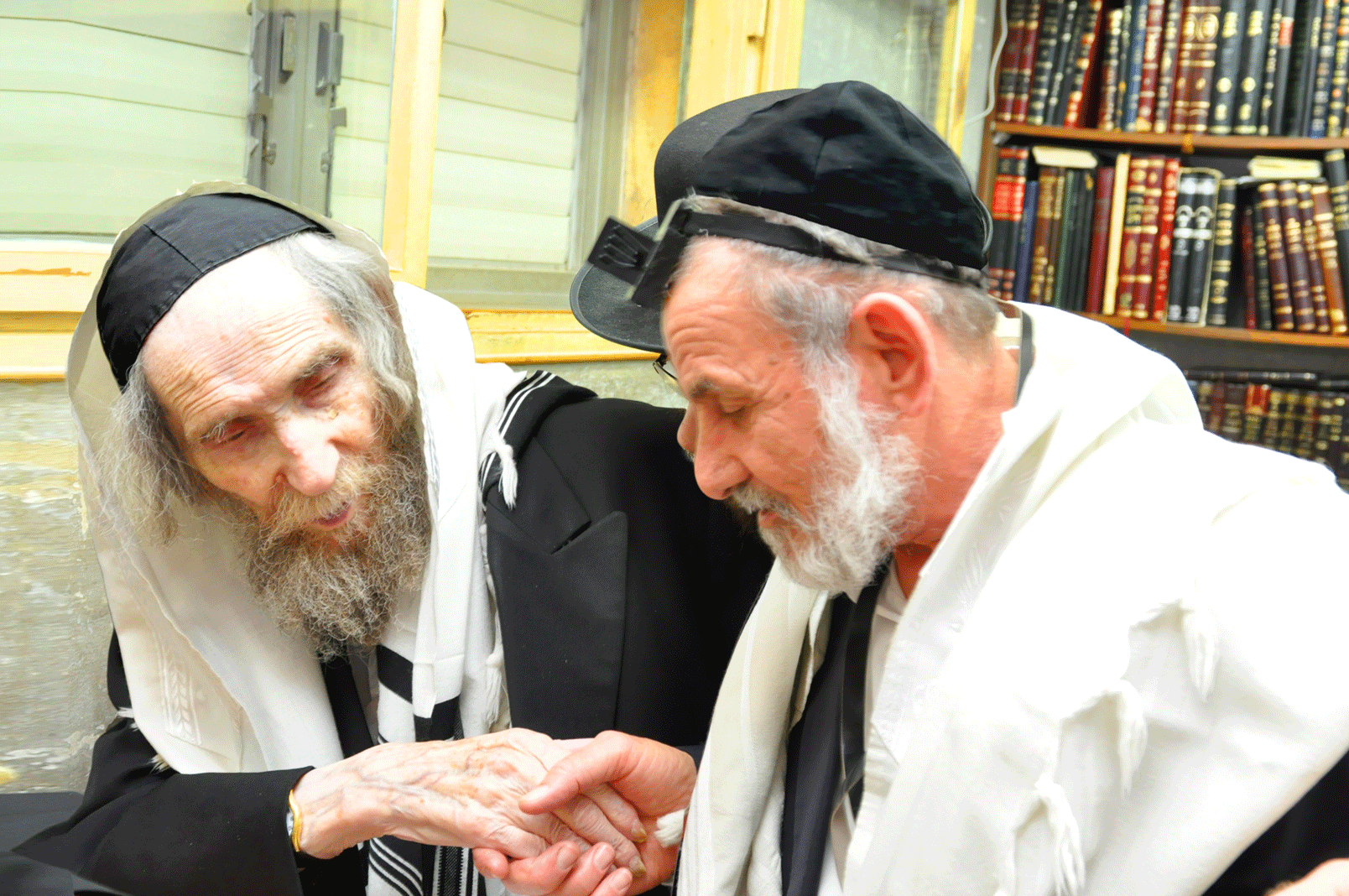 הרב ציון בוארון